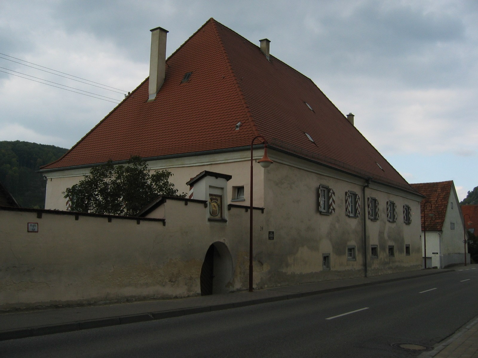 Straßberg, Zollernalbkreis: Bauhof, ehemals Fruchtkasten des Stifts Buchau